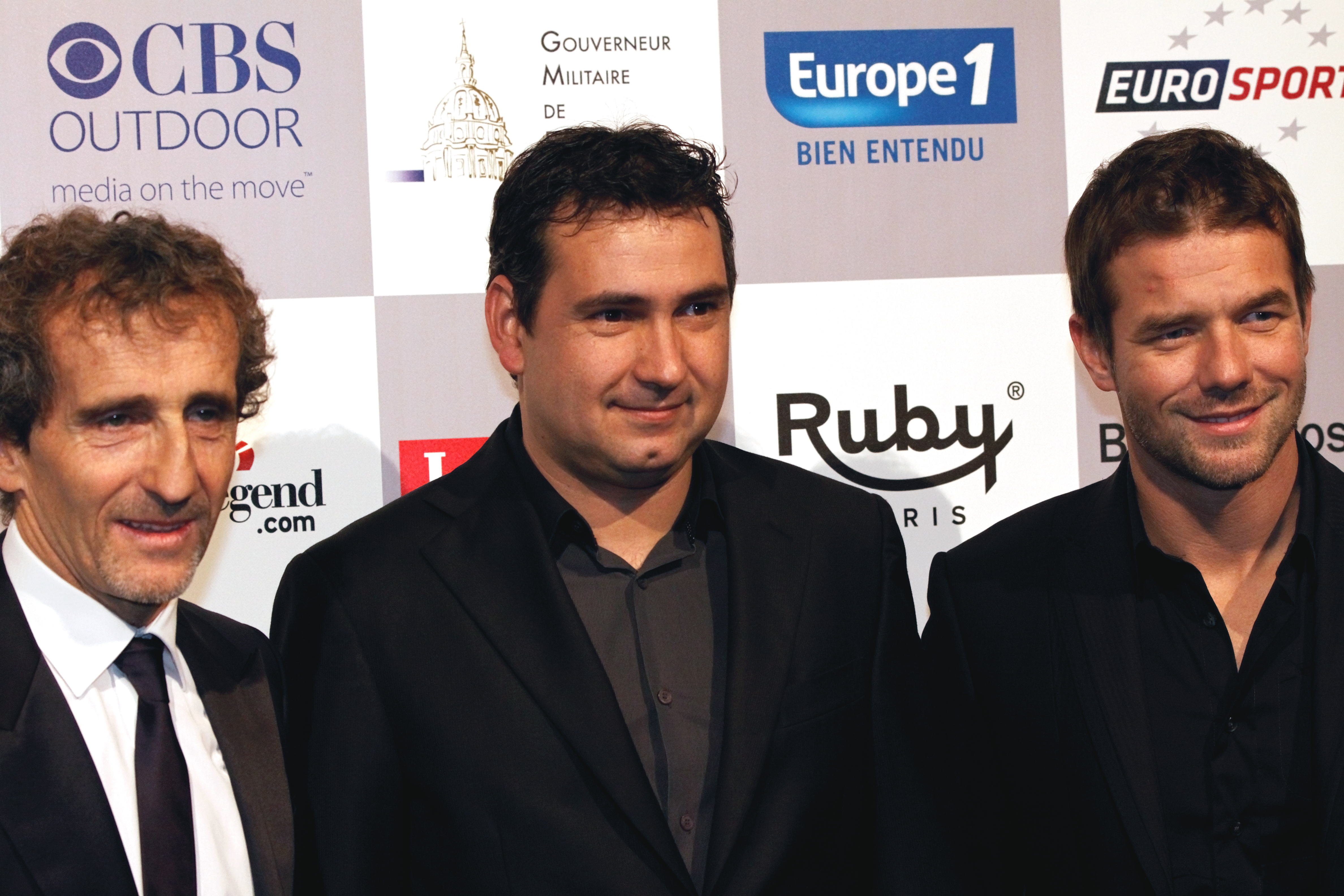 Alain Prost, Daniel Elena et Sébastien Loeb lors du cocktail du festival automobile international 2012 aux Invalides à Paris.